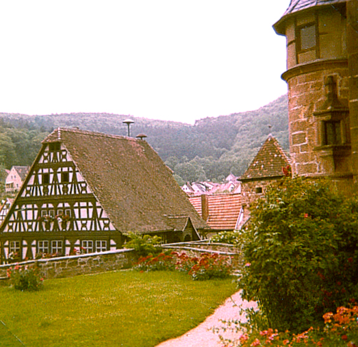 Dörrenbach Fotograf: Alexander Buschorn (1978)